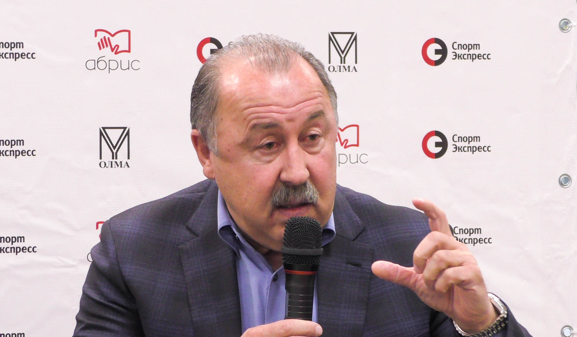 Валерий Газзаев в Московском Доме Книги 05.06.2017.